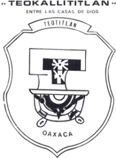 Escudo de Teotitlán de Flores Magón, Oaxaca